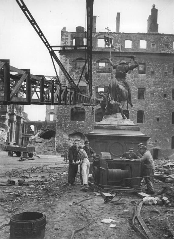 Illus-Igel-Kemlein Kno-Leu. 11.10.50 Abriss der Schlossruine in Berlin. UBz: Mit Hilfe zweier Kräne werden die wertvollen Plastiken, Reliefts und Säulen von den Fassaden heruntergeholt.